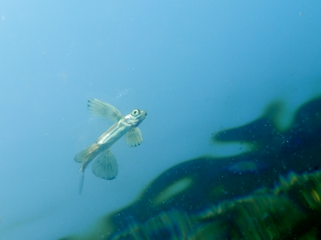 トビウオの一種1 Cypselurus sp.